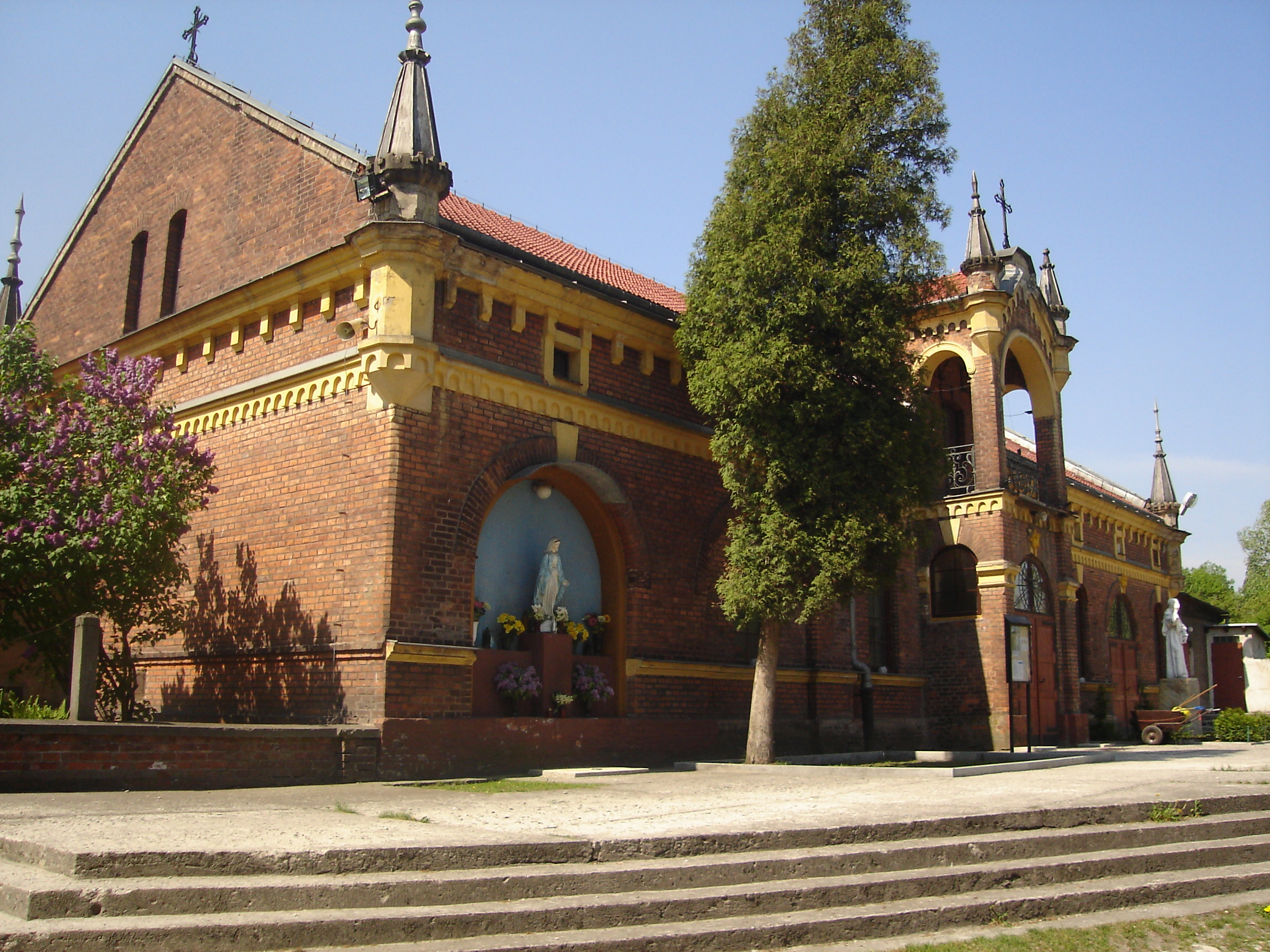 Prokocim - Kościół Rektoralny Augustianów p.w.Św. Mikołaja z Tolentino